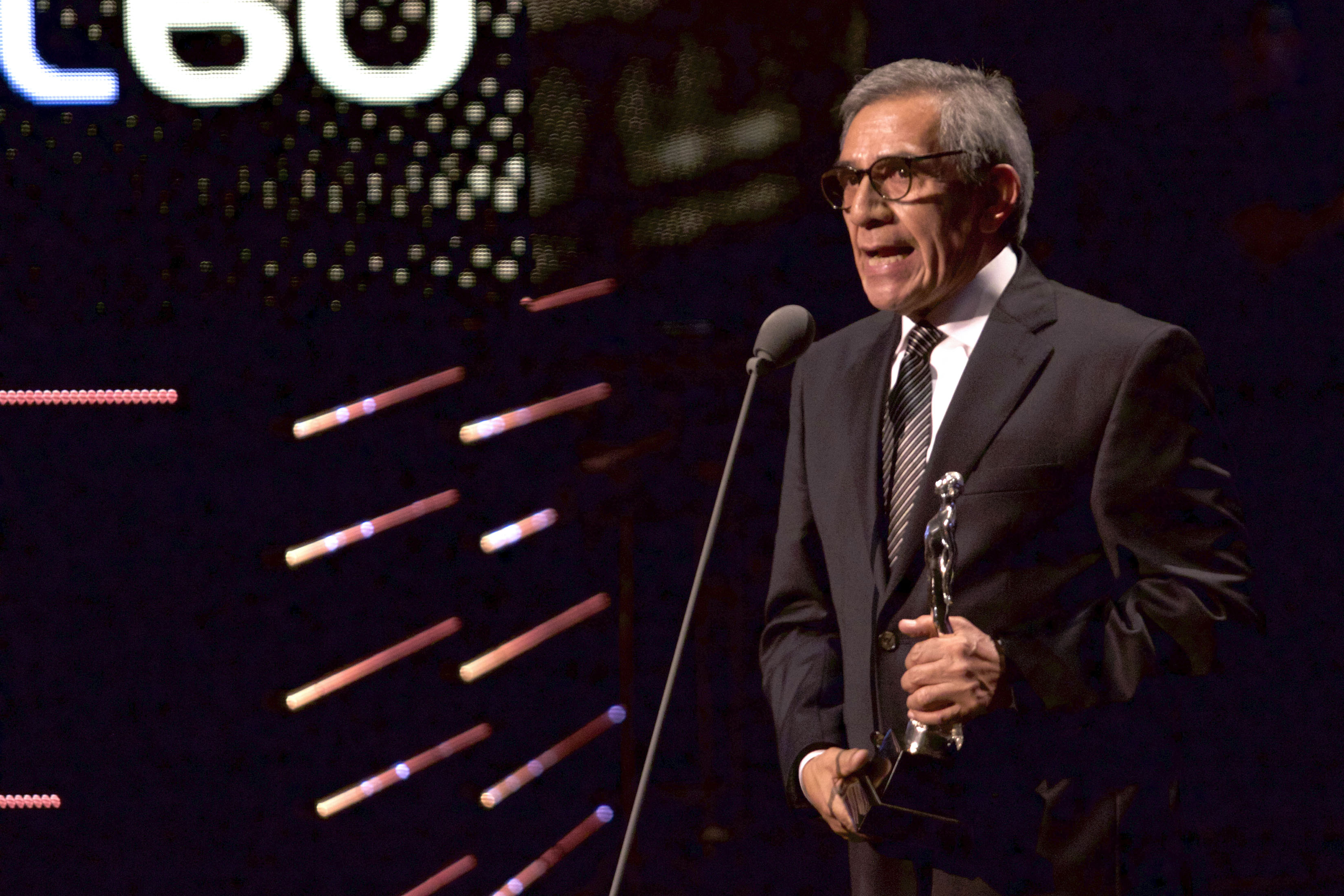 Mejor Actor lo recibe Eligio Meléndez por Sueños en otro idioma.